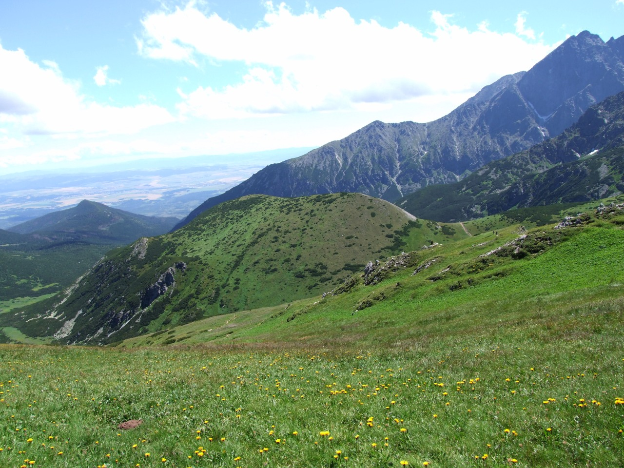 Bielska Kopa i Wyżnia Przełęcz pod Kopą. W tle Steżki, Rakuska Czuba i Kieżmarskie Szczyty